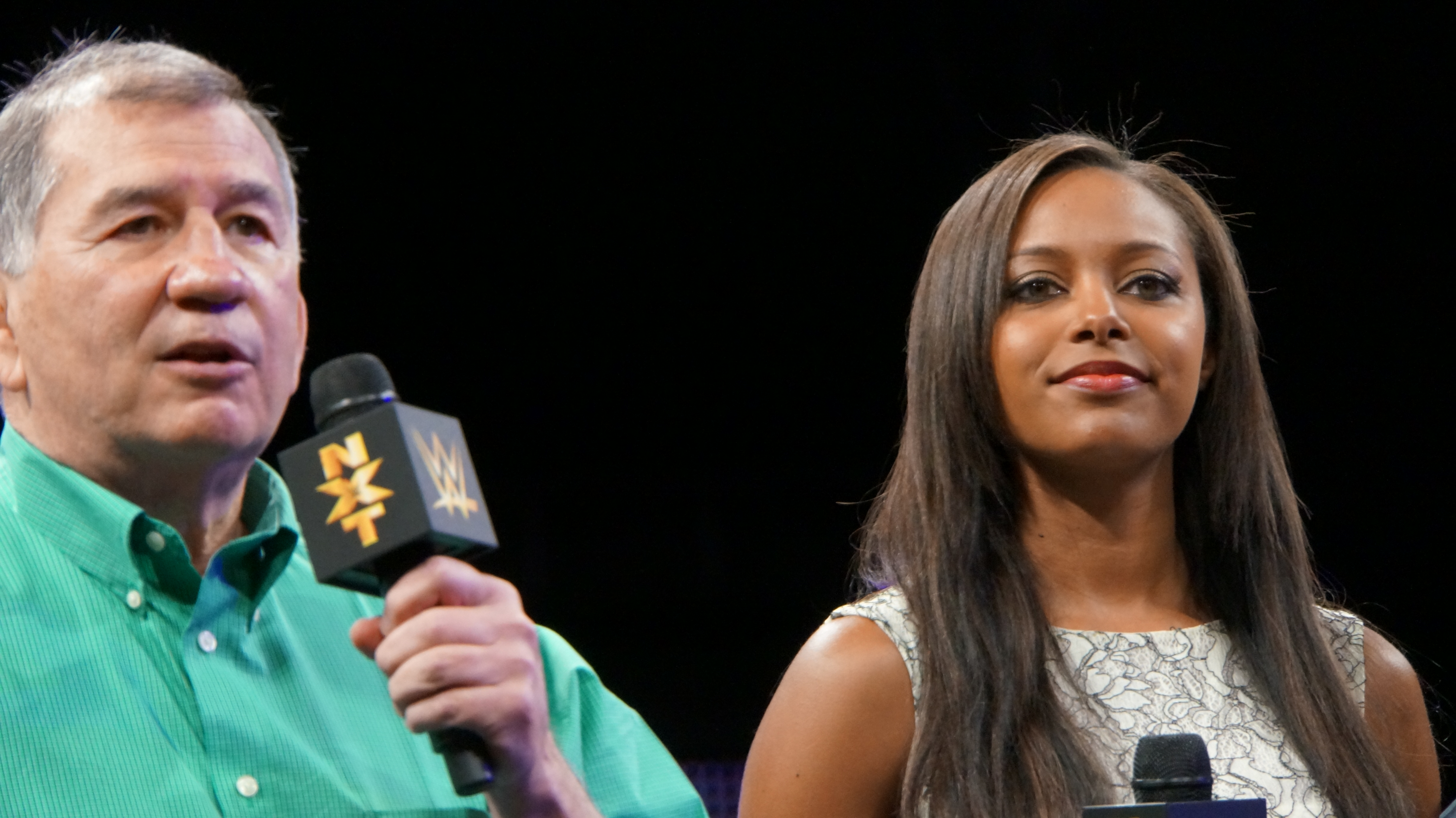 2014-04-05_08-30-25_NEX-6_DSC07889